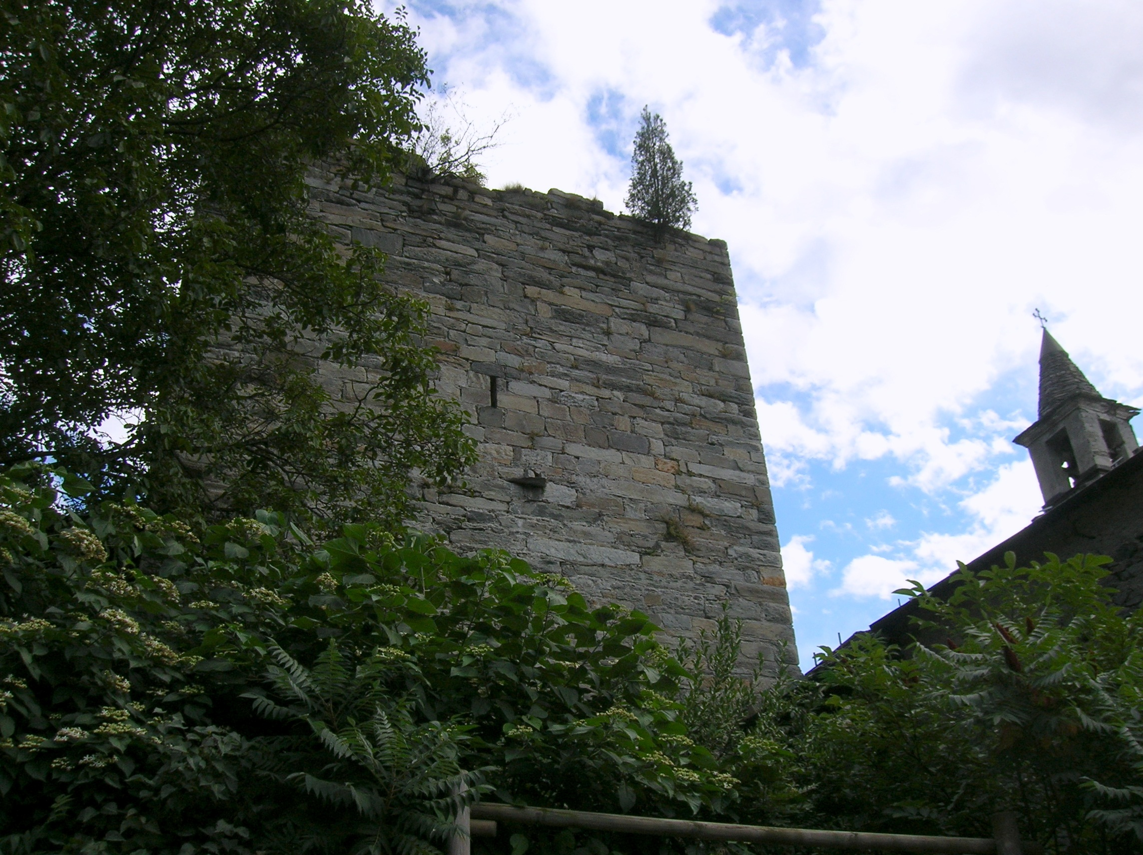 "Complesso monumentale di Osta", detto anche "Casaforte e torre di Ville", "casaforte di Ville" o "La Tor dé l'Ohtà". Arnad, Valle d'Aosta, Italia.